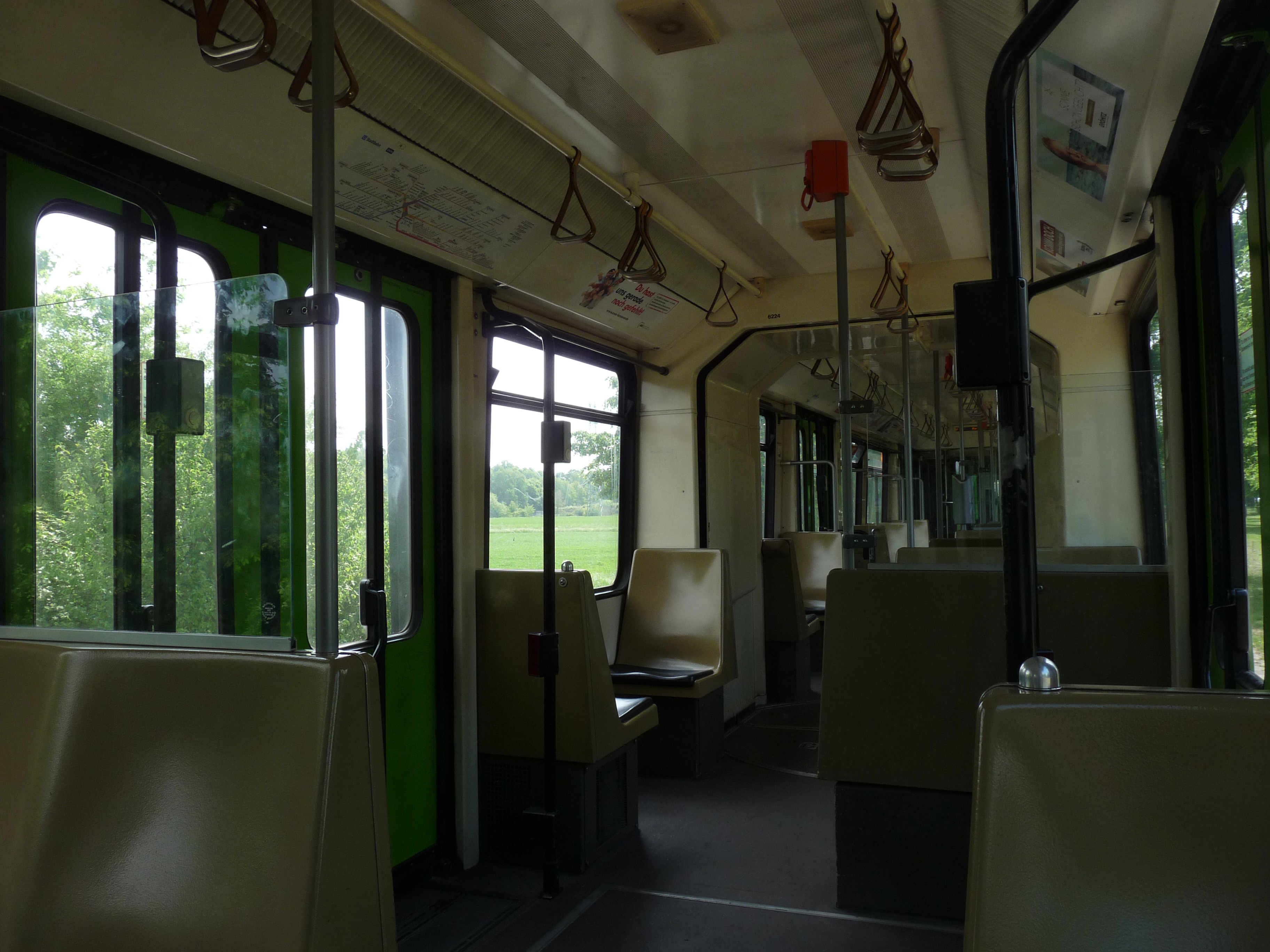 Het interieur van een tram in Hannover op tramlijn 2